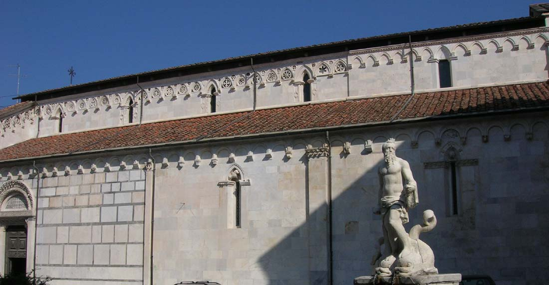 Fiancata del Duomo di Carrara. Immagine di mia proprietà e rilasciata con licenza GFDL.